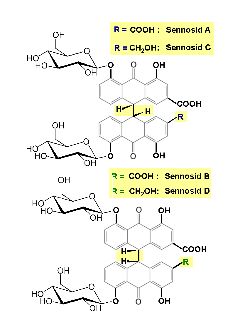 Sennoside